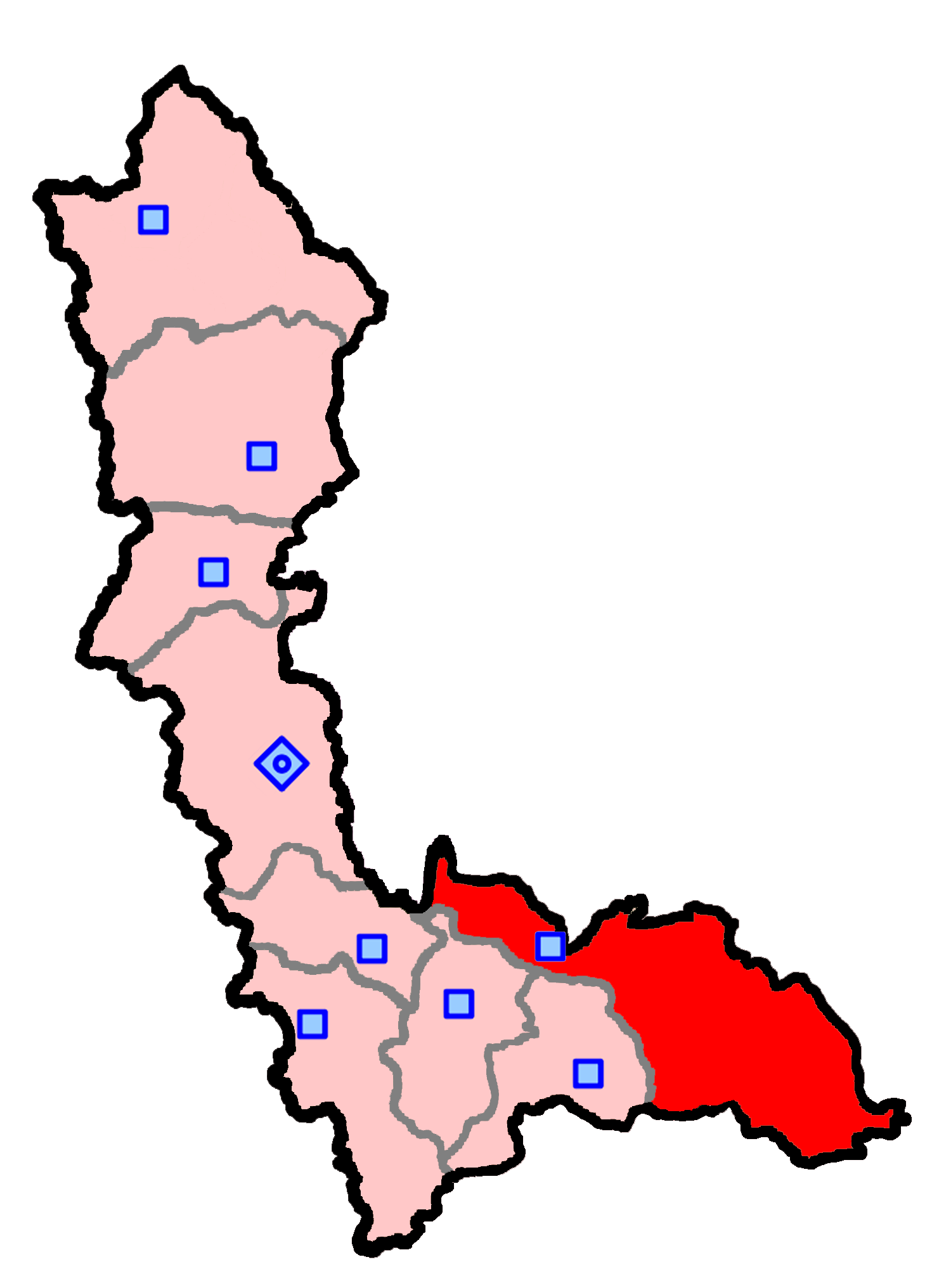 حوزهٔ انتخاباتی میاندوآب و شاهین‌دژ و تکاب برای انتخابات مجلس شورای اسلامی